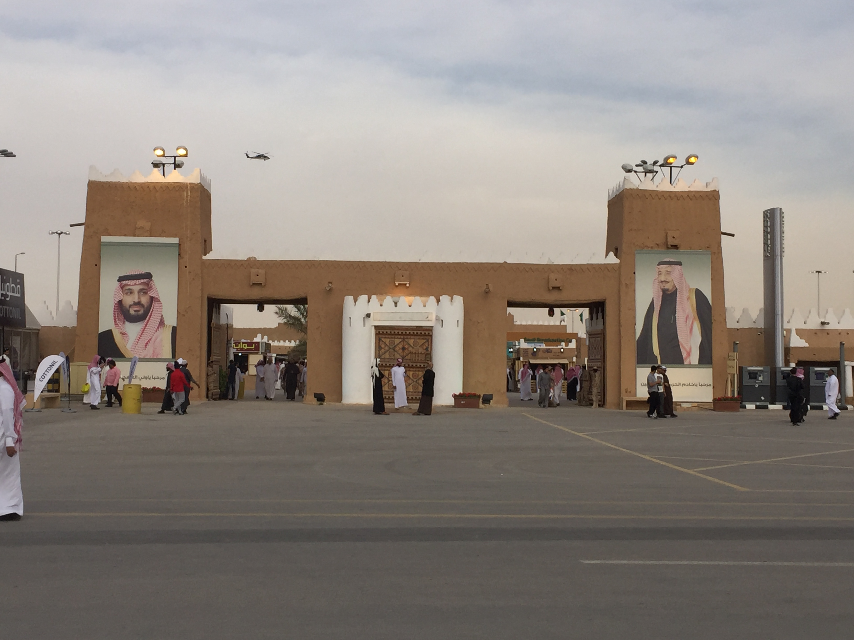 ساحة عامة في مهرجان الجنادرية.